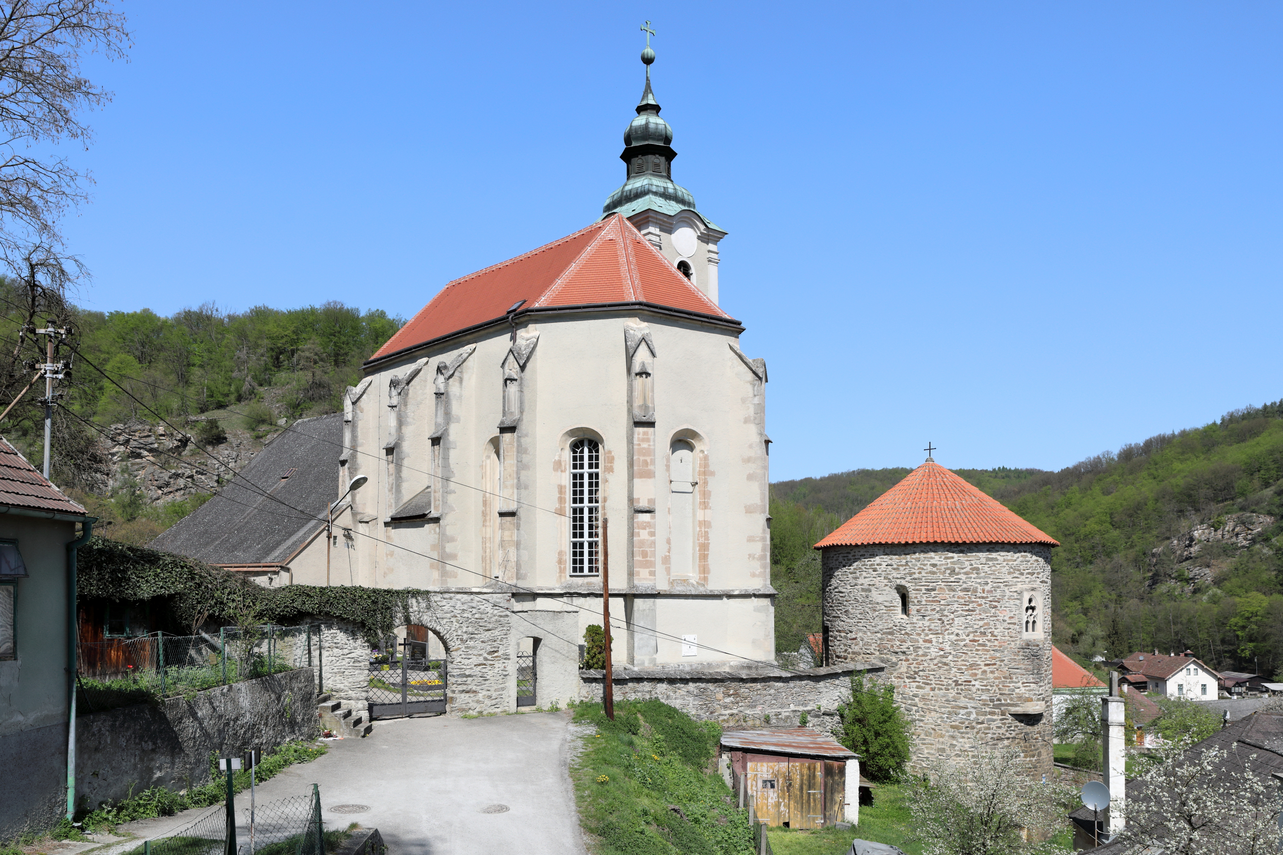 Die röm.-kath. Stadtpfarrkirche hl. Veit in der niederösterreichischen Stadt Hardegg und rechts davor der Karner.Die Kirche besteht aus einem romanischen Langhaus, einem hochgotischen Chor (um 1400), sowie einem barocken Turm aus dem Jahr 1754 und wurde ab 1743 barockisiert. Der Karner, ein unverputztes, aus Bruchsteinen romanisches Rundbauwerk mit stumpfem Kegeldach, wurde in der Zeit zwischen 1150 und 1160 errichtete.